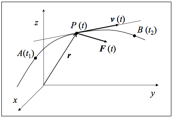 Lan magnitude fisikoa definitzeko elementuen eskema.